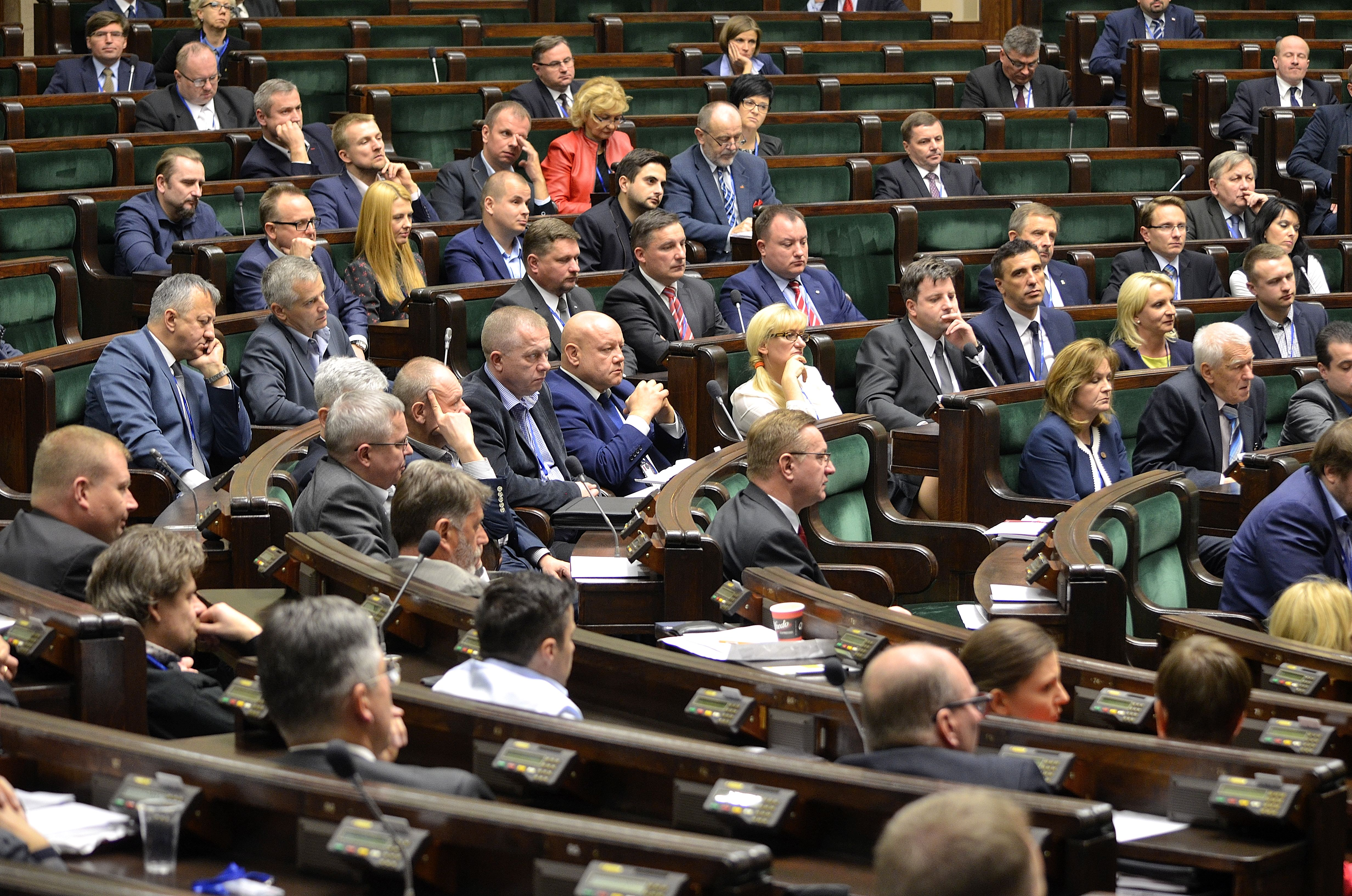 Szkolenie dla nowo wybranych posłów VIII kadencji zorganizowane przez Kancelarię Sejmu